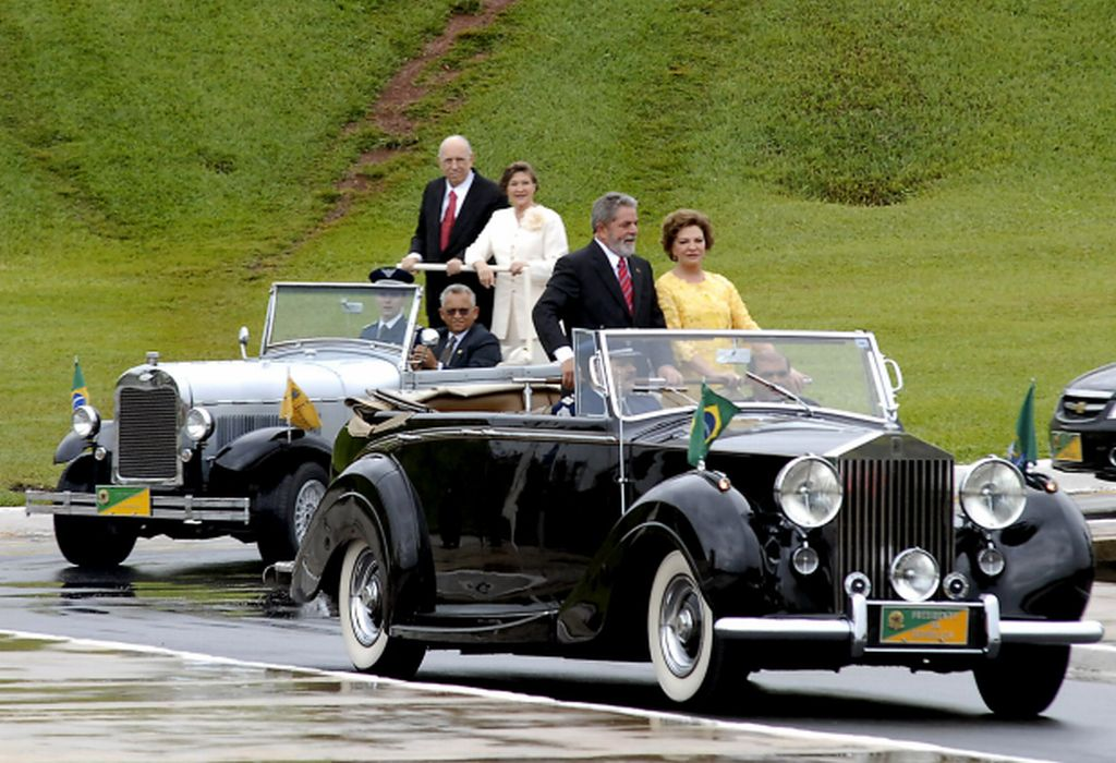 (portuguese) Rolls Royce da Presidência da República, modelo Silver Wraith (Espectro de Prata), ano 1952, desfila pelas ruas de Brasília, com o presidente Luiz Inácio Lula da Silva e esposa